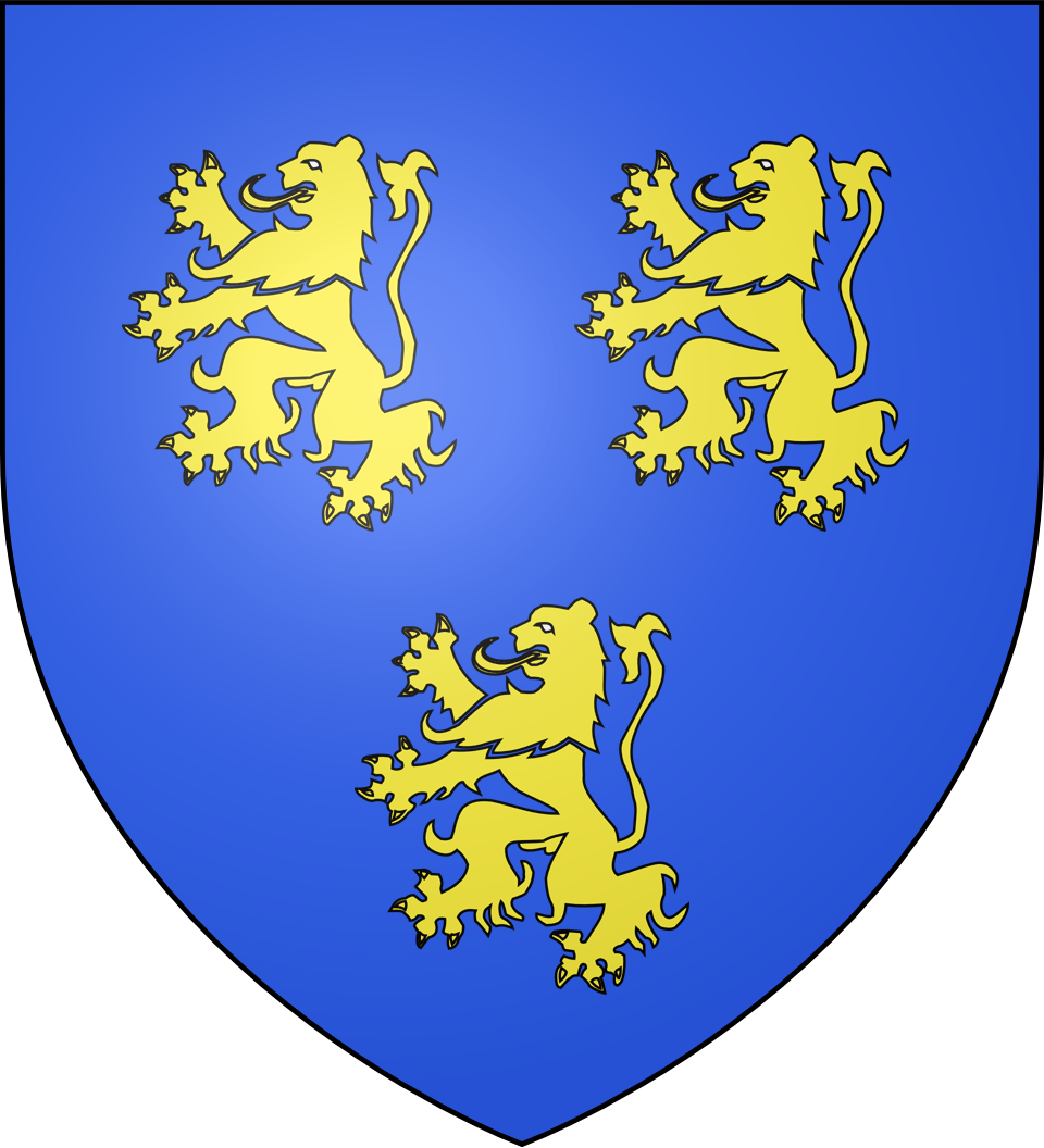 Blason de l'ancien pays du Cambrésis (Picardie) : d'azur aux trois lionceaux d'or